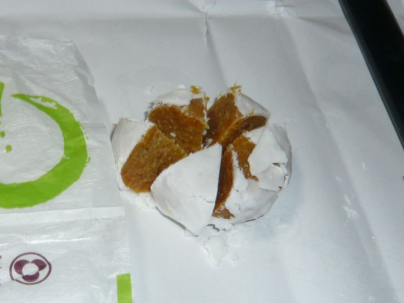 沖縄県の郷土菓子、桔餅（きっぱん）